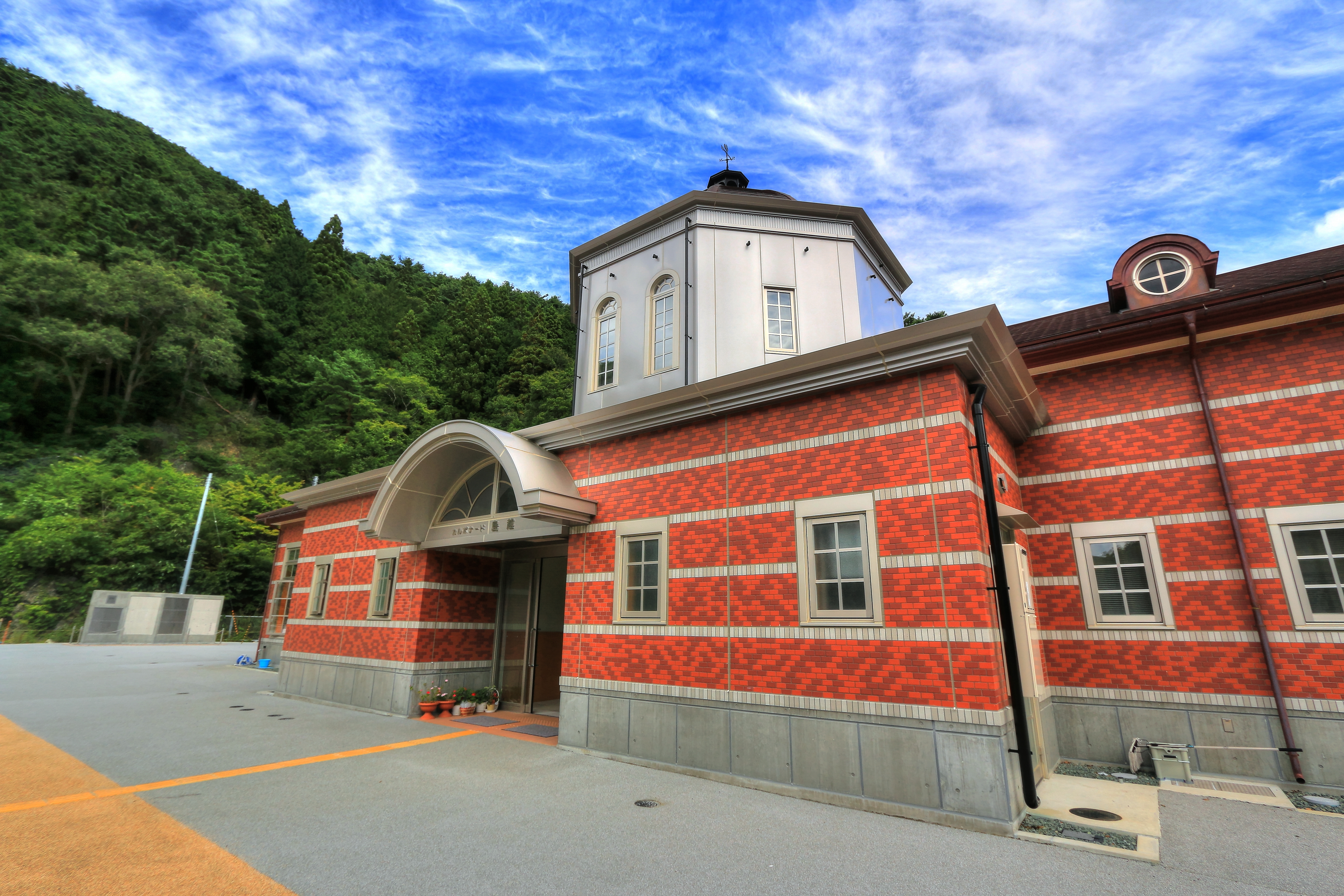 島越駅